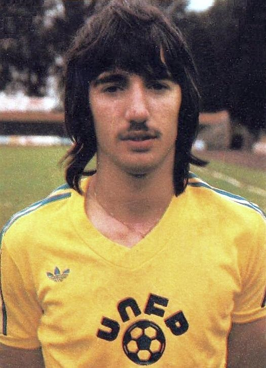 Bernard Genghini en 1979 (FC Sochaux), 'Footbal 79', Panini figurina n°297.